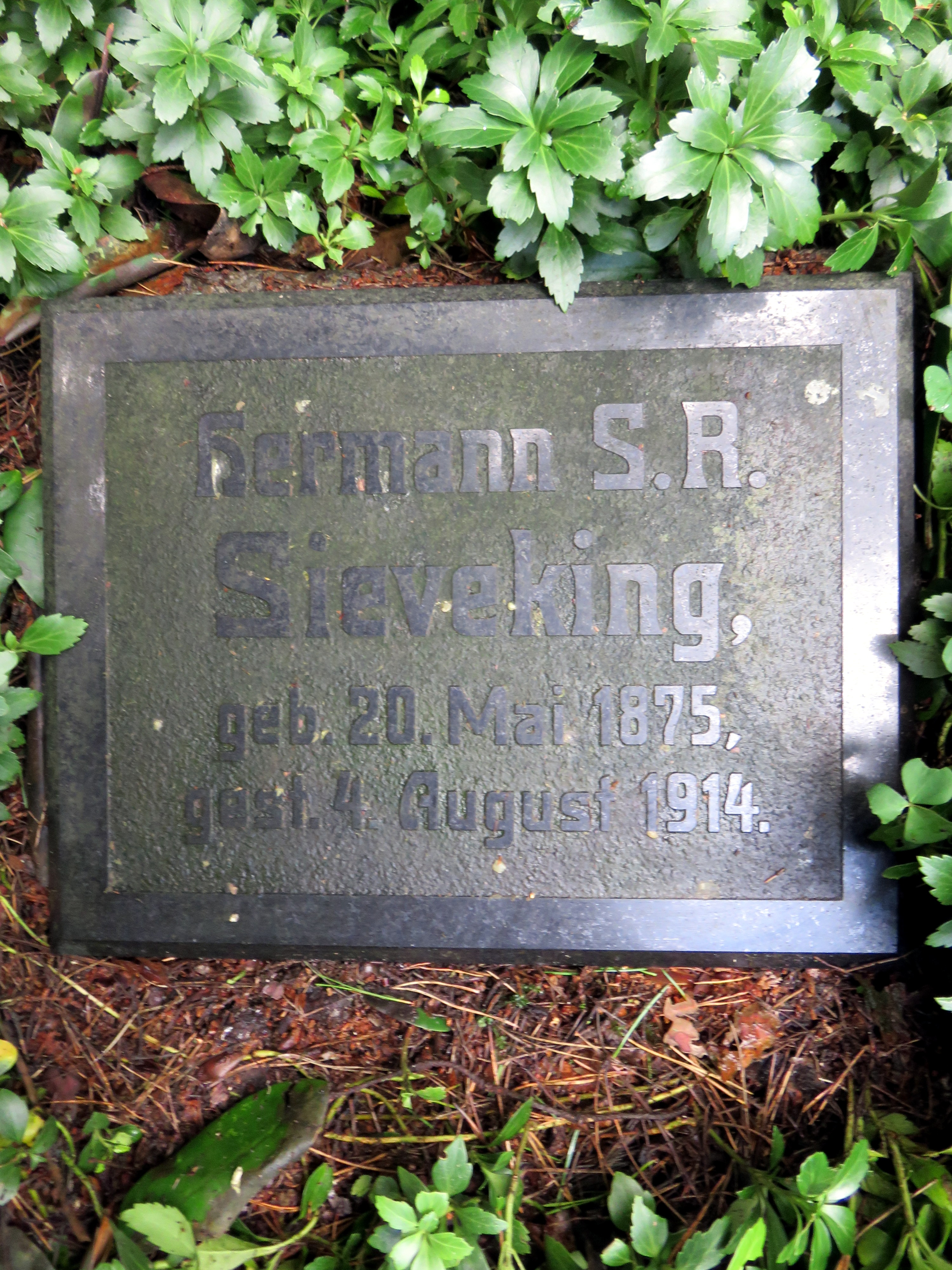 Grabkissen für den deutschen HochschullehrerHermann Samuel Reimarus Sieveking in der Sieveking-Familien-Grabanlage auf dem Hamburger Friedhof Ohlsdorf, Planquadrat S 25 / S 26.